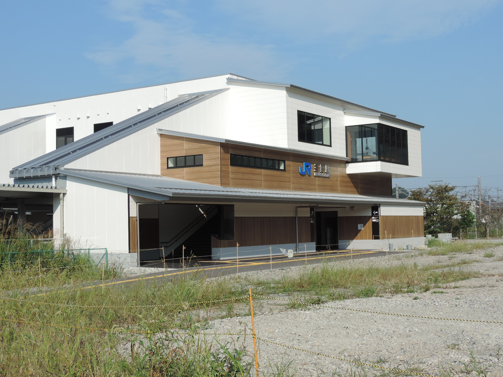 三雲駅南口。2017年10月撮影